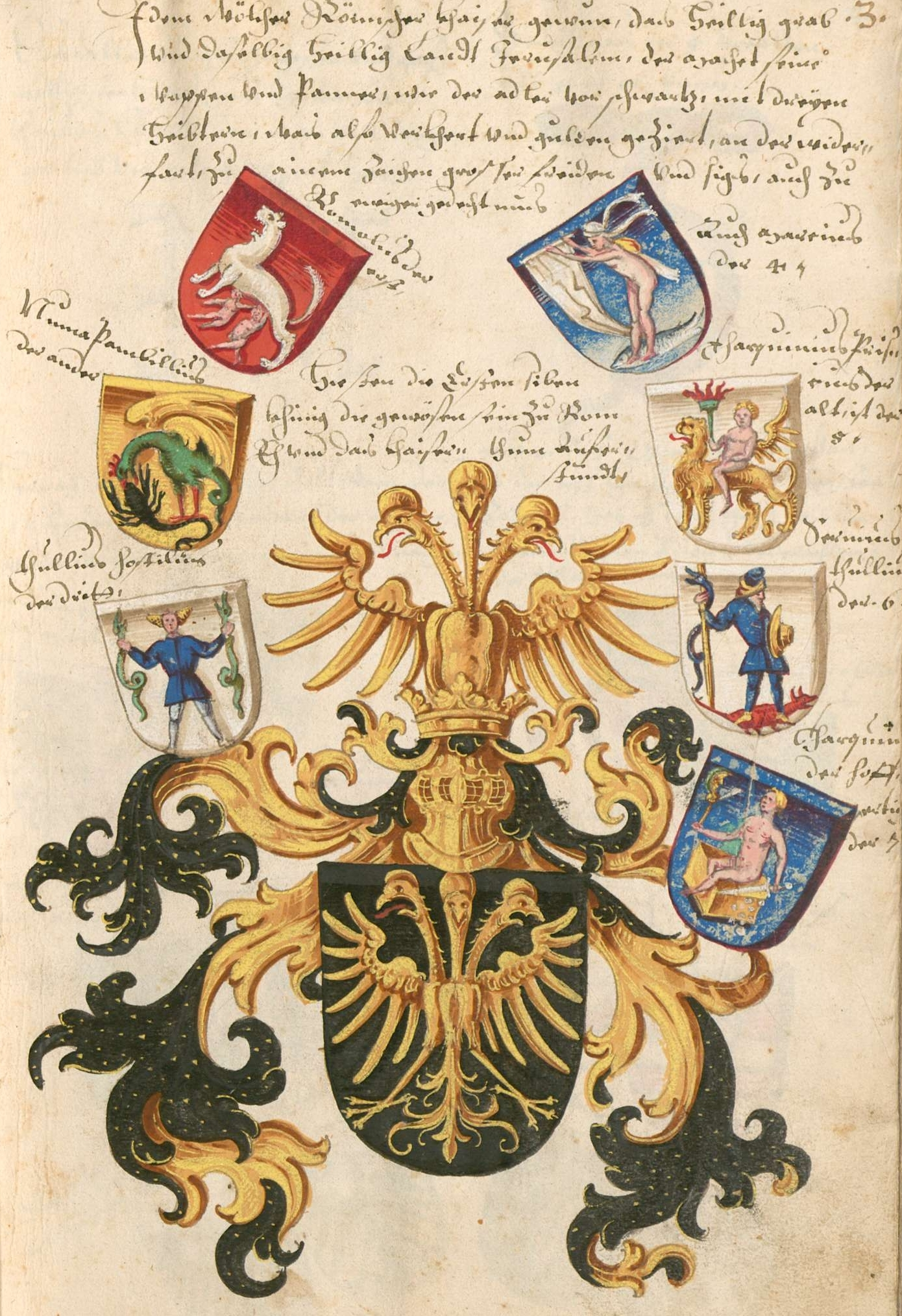 Герб из книги "Wappenbuch" Конрада Грюненберга, 1604